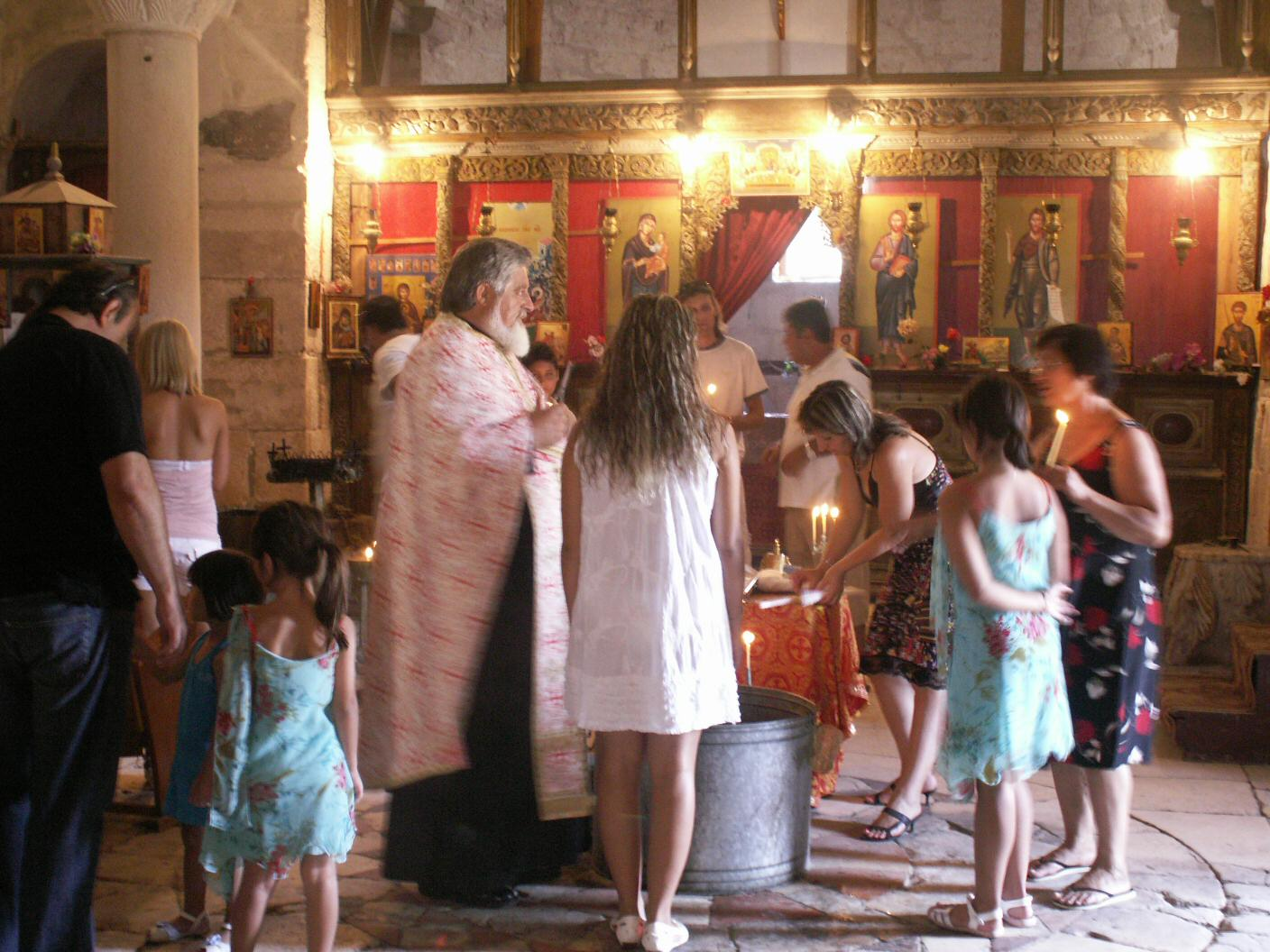 Apollonia - Driving Albania 166